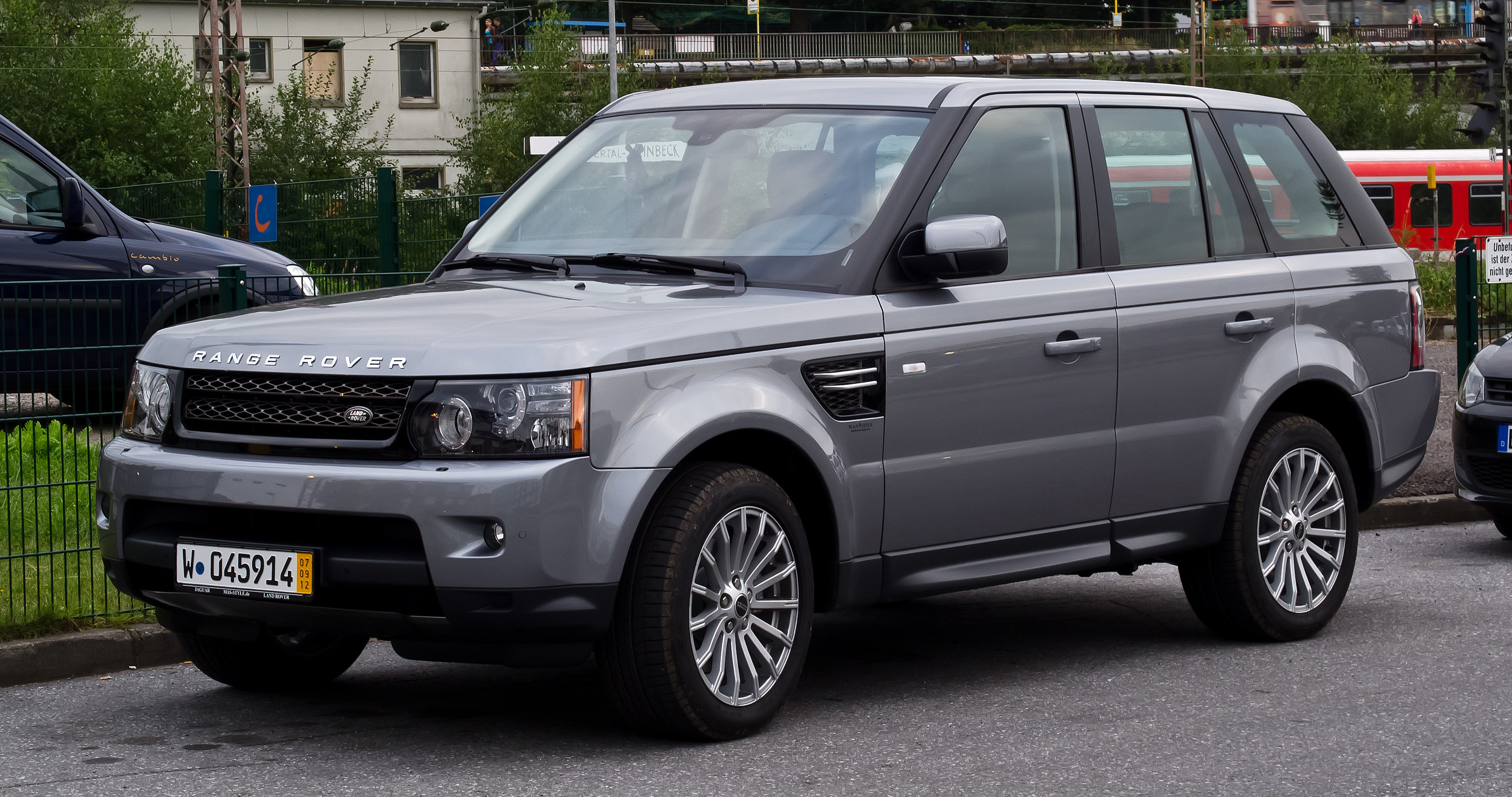 Range Rover Sport SDV6 SE (Facelift)